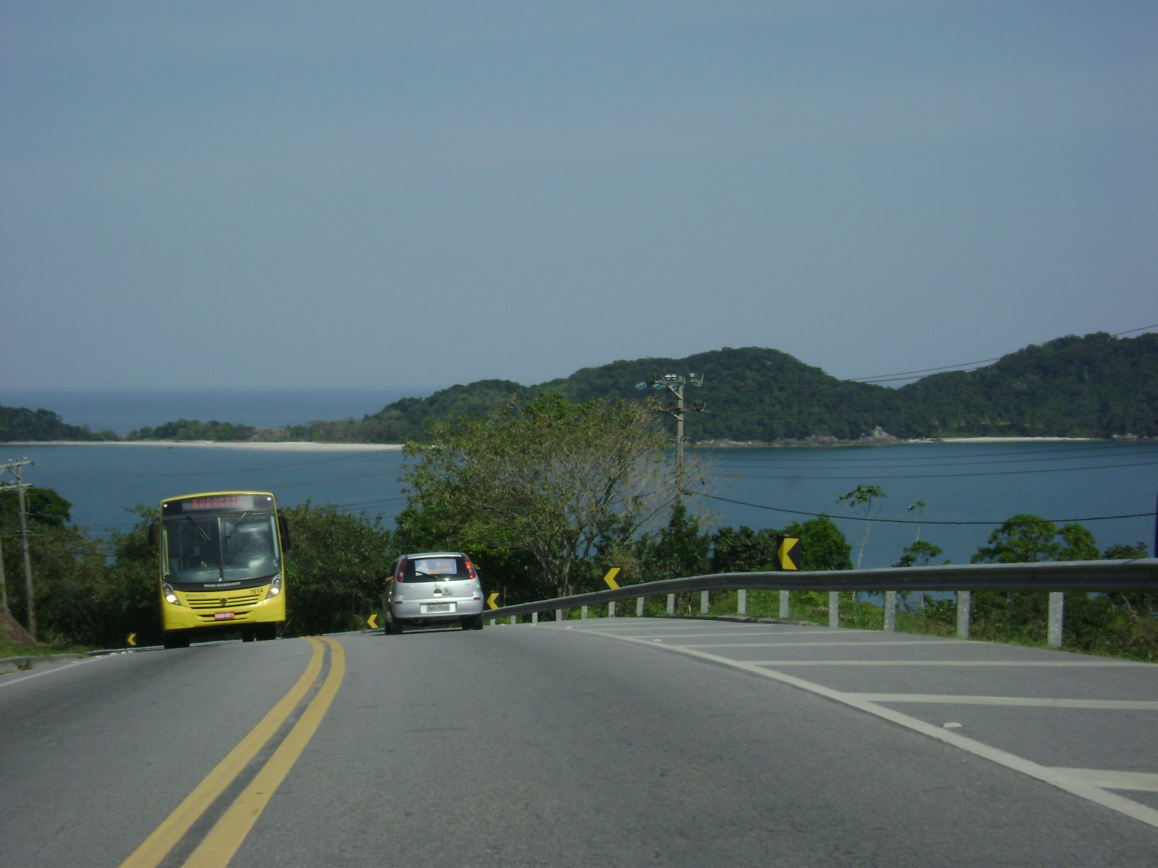 Rodovia Rio-Santos/Manoel Hipólito do Rego (BR-101/SP-55) entre Juqueí e a Praia Preta, no município paulista de São Sebastião.